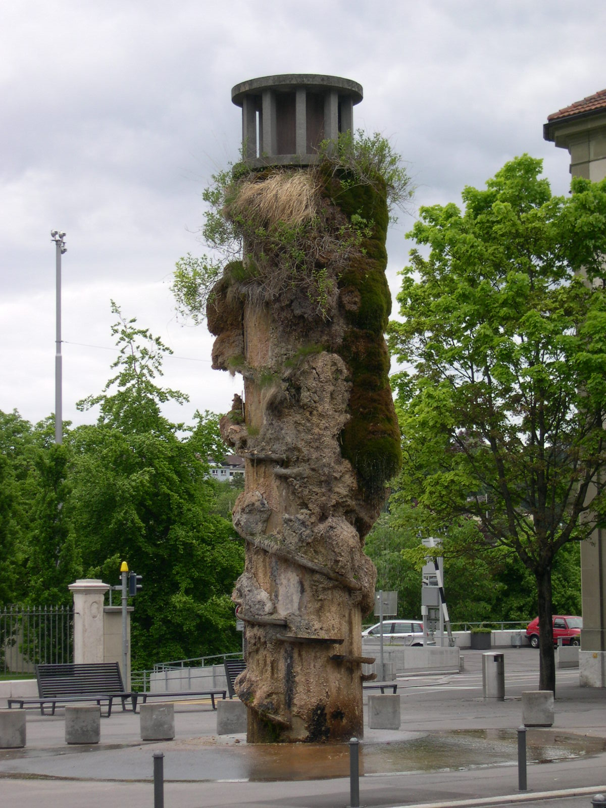 Der Oppenheimbrunnen in Bern/Switzerland